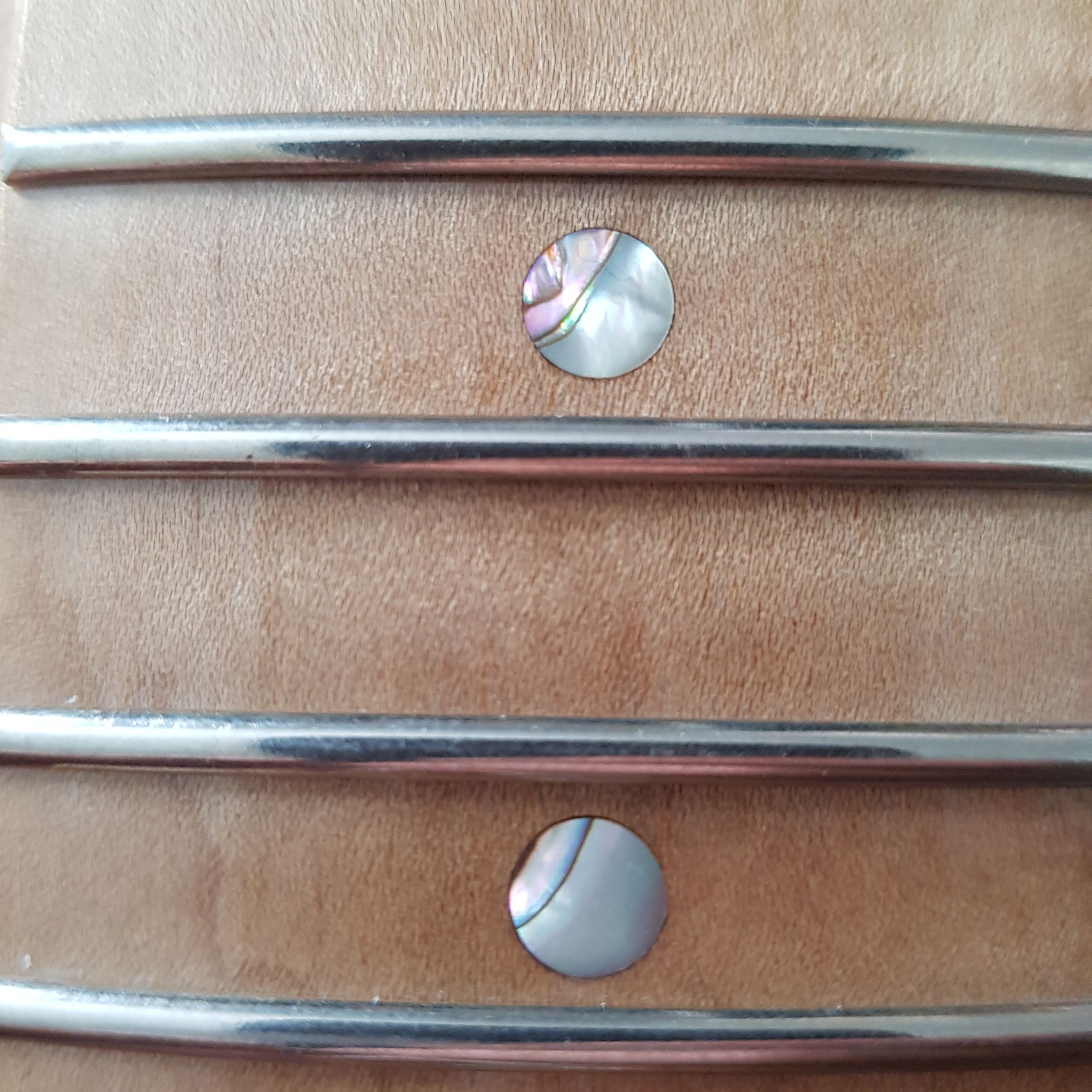 Perlemor av ulik kvalitet og opphav brukes ofte på gripbrett til strengeinstrumenter